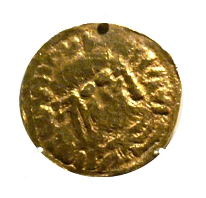 Karolingischer Solidus, 2. Hälfte 9. Jh.